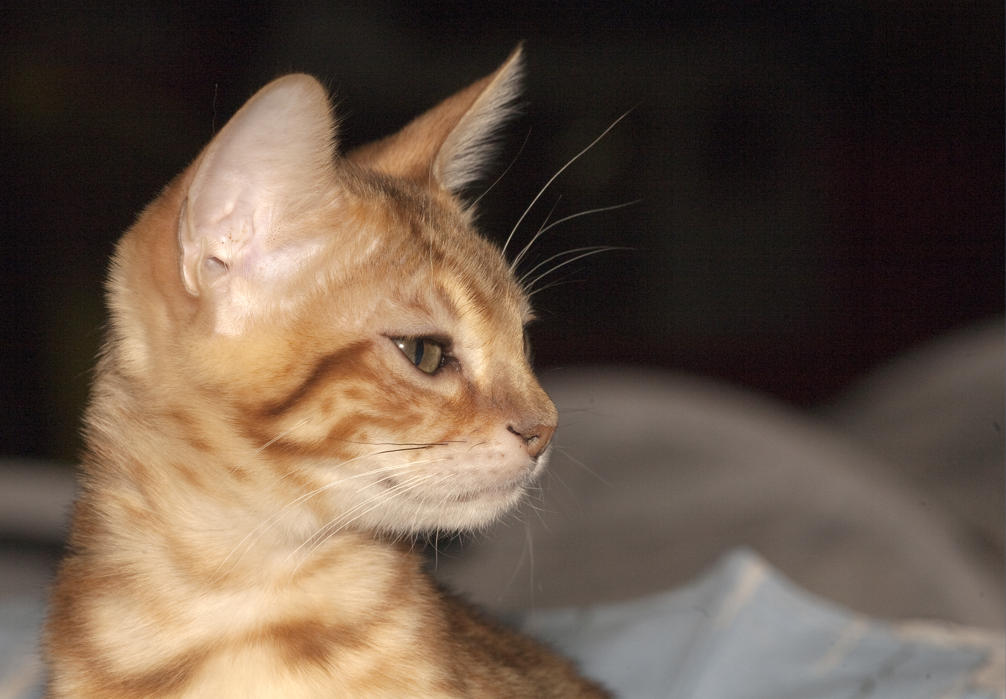 Бенгальский кот Magiccastle Onyx, №684 по каталогу «Содружество-2011» (WCF). Кот. Окрас: чёрный сил-тэбби пойнт (BEN n 21 33). Дата рождения: 22/07/2007. Владелец: И.В.Дергачёва. Клуб «Мономах», Владимир